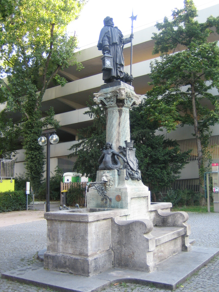 Nachtwächterbrunnen in Stuttgart, Halmhuber/Fremd 1899